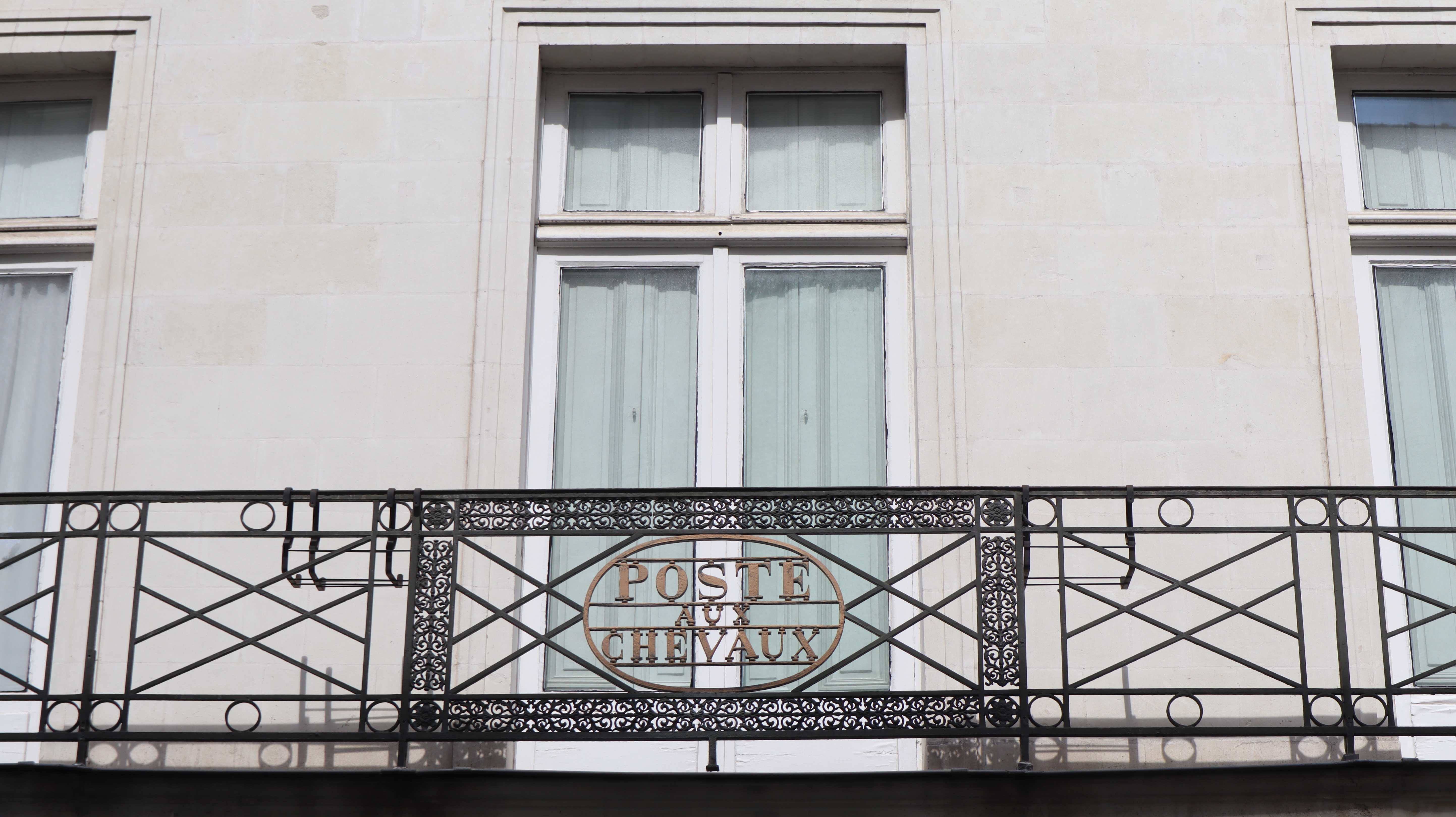 Poste aux chevaux de Nantes (44) sise 20 Rue Jean Jaurès, autrefois Rue des Arts.